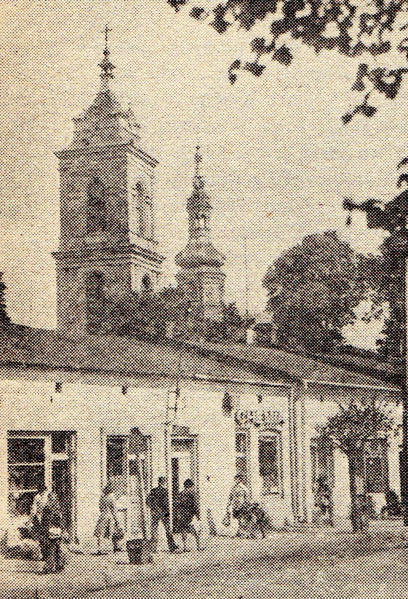 Włoszczowa w 1979r.